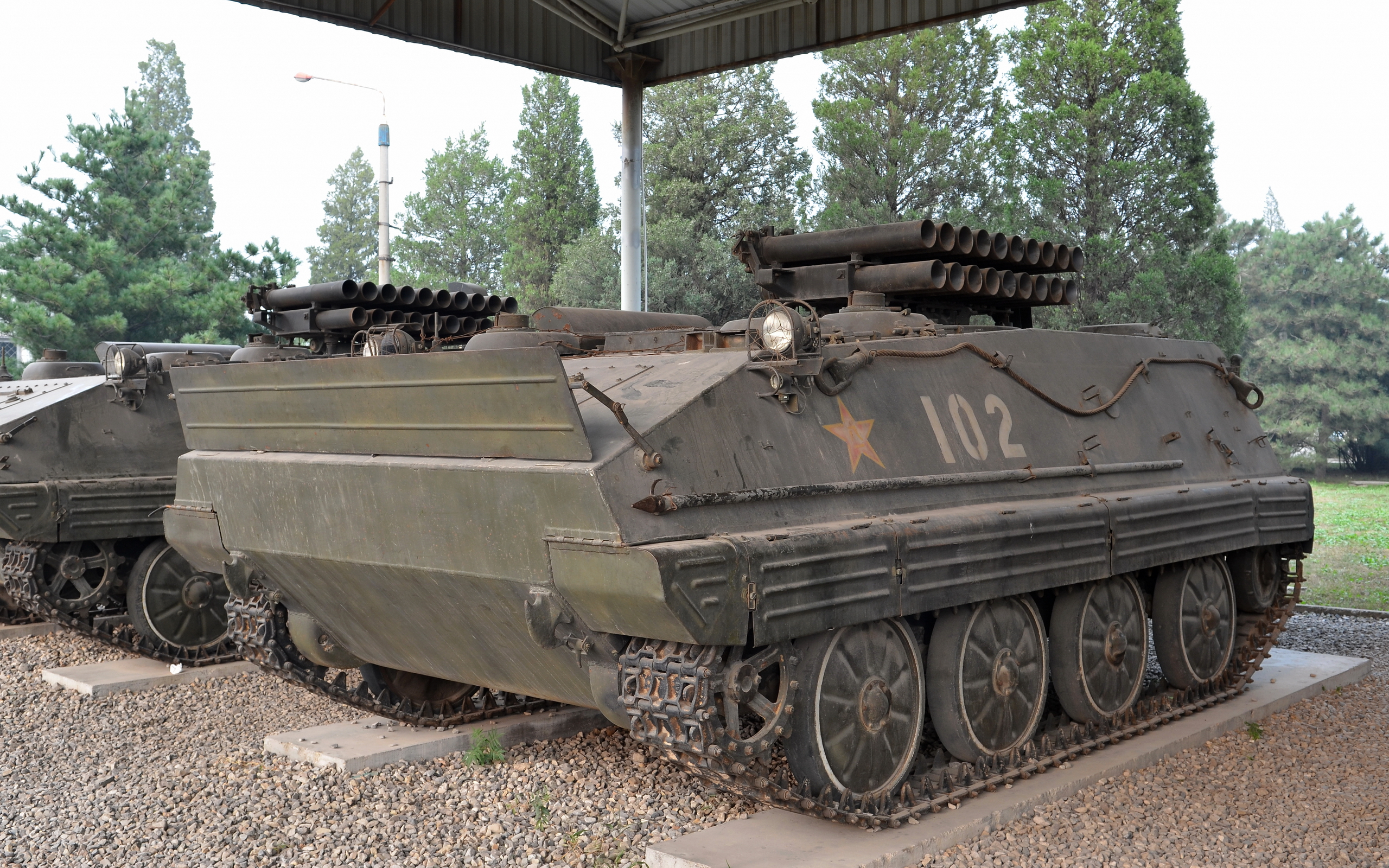 70式 (工厂代号WZ303) 130毫米 (19管) 自行火箭炮